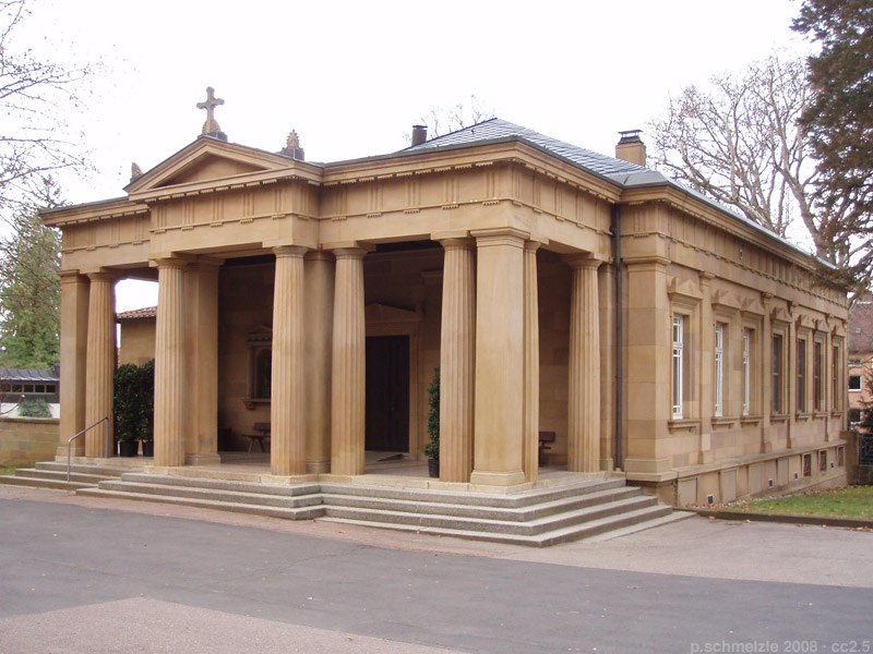 Eines der Hauptgebäude auf dem Hauptfriedhof in Heilbronn